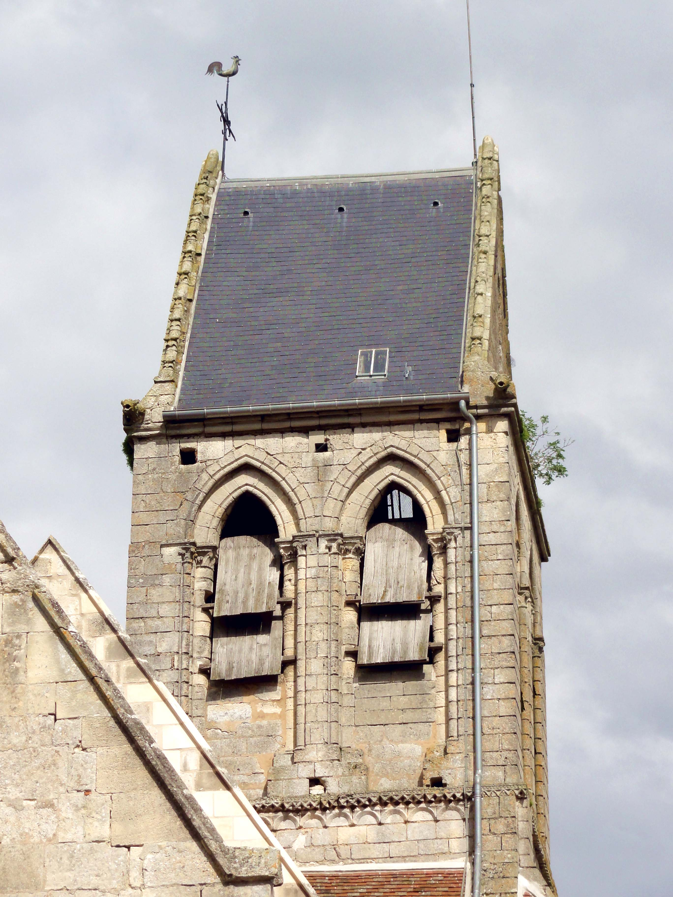 Clocher, vue depuis l'ouest.